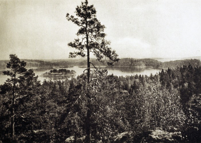 Furuholmen från Karlsbaderberget.